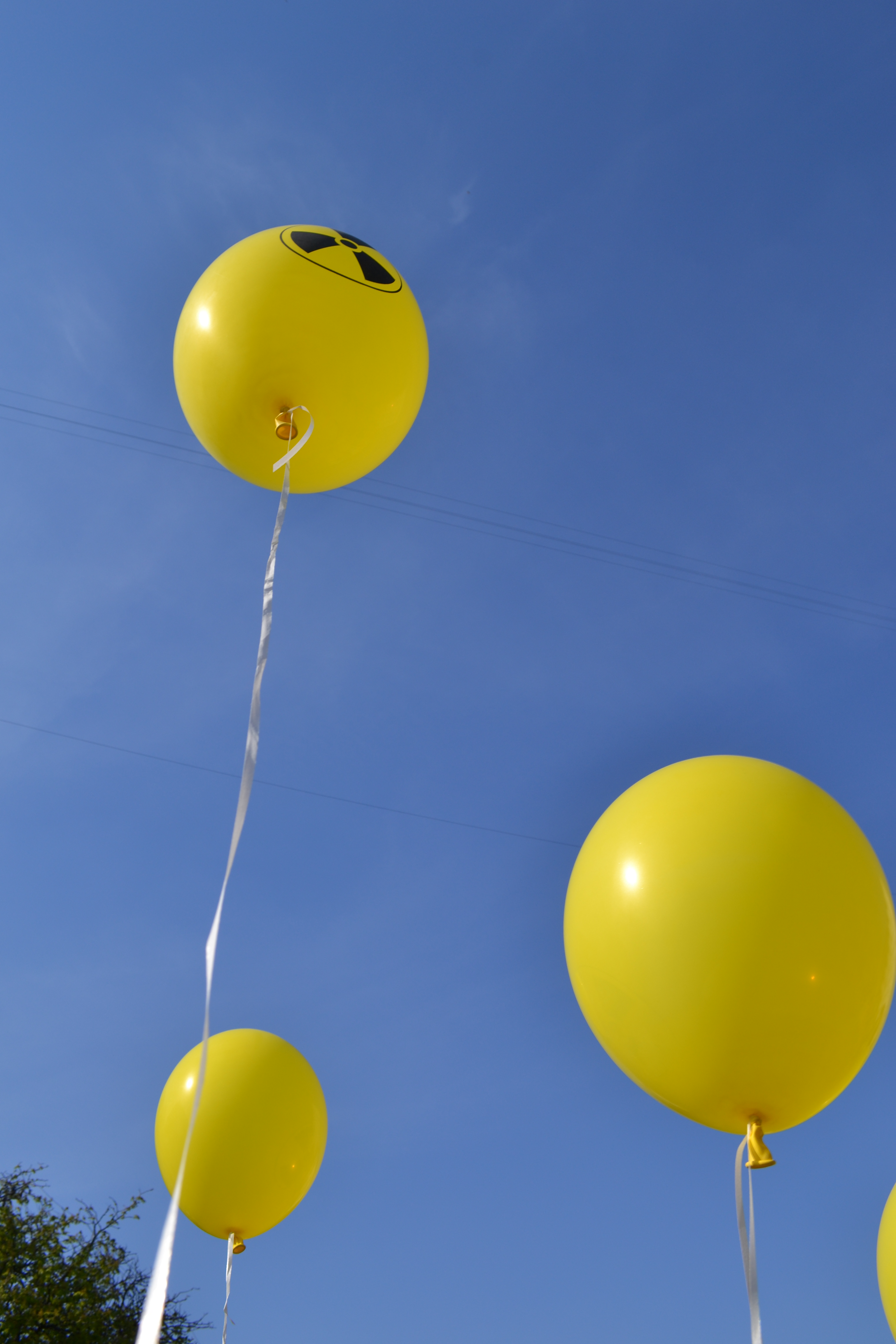 Беларуская (тарашкевіца): Чарнобыльскі шлях